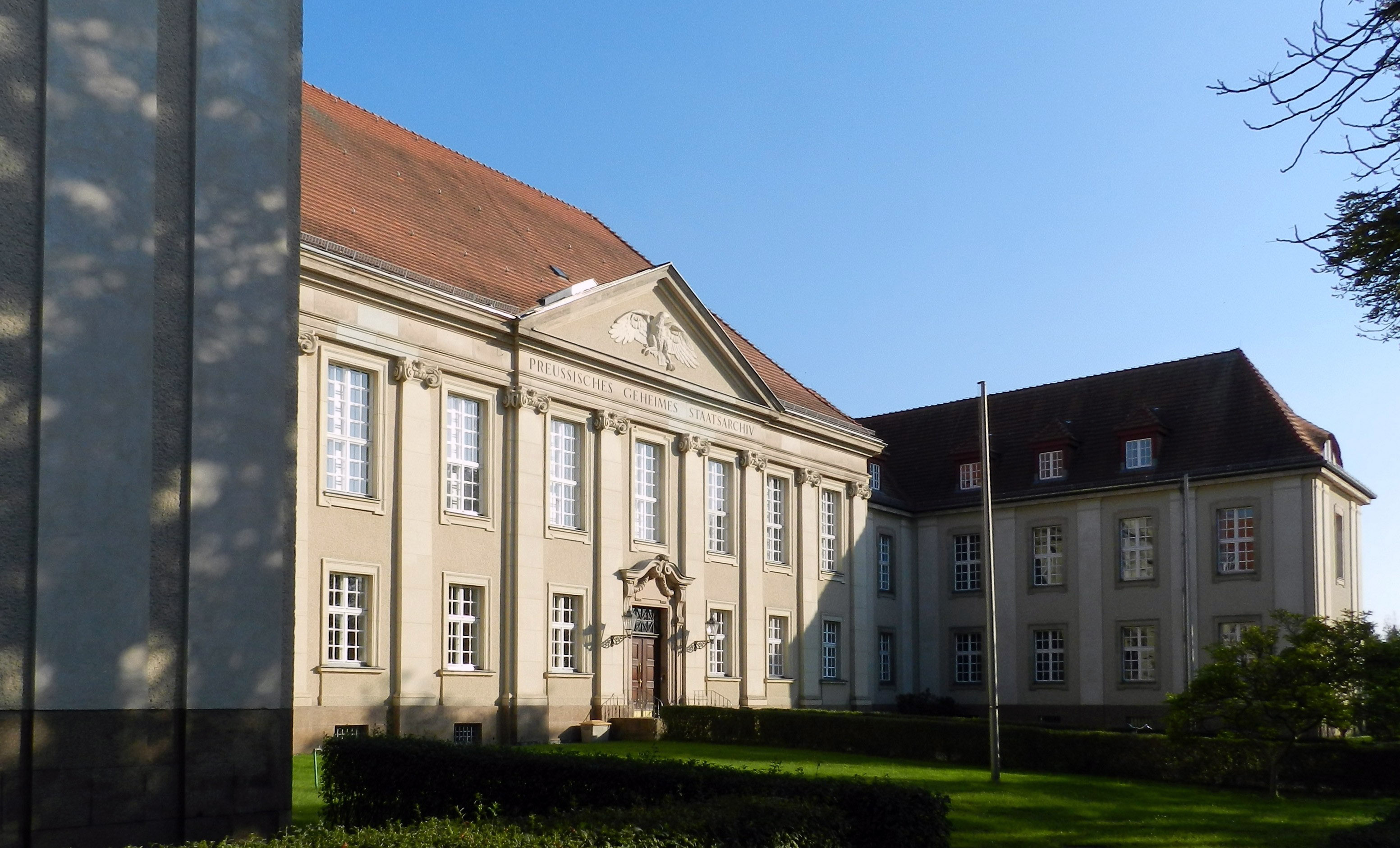 Archivgebäude Archivstr. 12-14, Berlin-Dahlem. Bauzeit: 1915-23, Entwurf: Eduard Fürstenau.